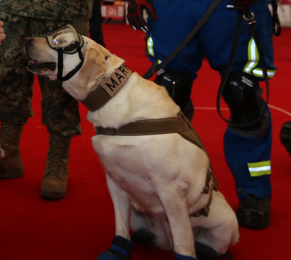 Frida, perra de rescate de la marina durante el evento Dejando Huella CDMX. Adopción Responsable de Animales de Compañía. (Disponible